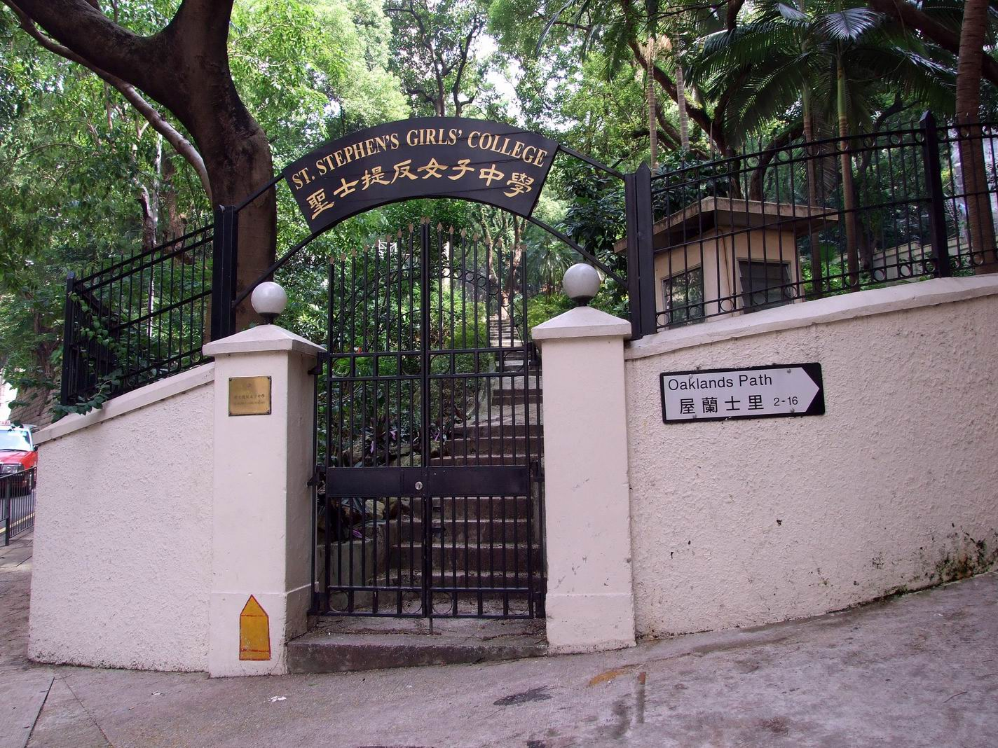 聖士提反女子中學